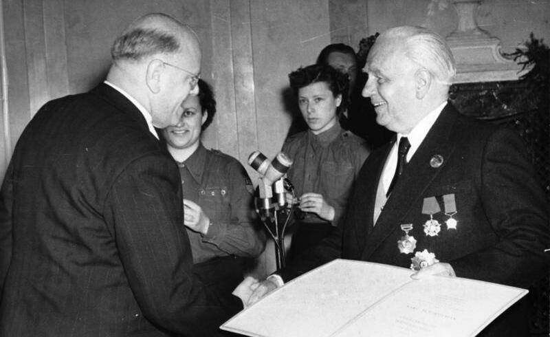 Vaterländischer Verdienstorden für Karl Schirdewan Zentralbild/Heilig, 6.5.1955 Präsident Pieck verlieh an hervorragende Persönlichkeiten den Vaterländischen Verdienstorden in Gold Am 6.5.1955 verlieh Präsident Pieck in seinem Amtssitz in Berlin-Niederschönhausen zu Ehren des 10. Jahrestages der Befreiung vom Faschismus den Vaterländischen Verdienstorden in Gold an hervorragede Persönlichkeiten für ihren Kampf gegen den Faschismus und ihre Verdienste um den Aufbau der Deutschen Demokratischen Republik. UBz: Präsident Wilhelm Pieck überreicht Karl Schirdewan, Mitglied des Politbüros der SED, die Urkunde und beglückwunscht ihn zu seiner Auszeichnung. Abgebildete Personen: Pieck, Wilhelm: Präsident, Politbüro der SED, Vorsitzender der KPD, DDR Schirdewan, Karl: Volkskammerabgeordnete, Politbüro des ZK der SED, DDR (GND 120487098)